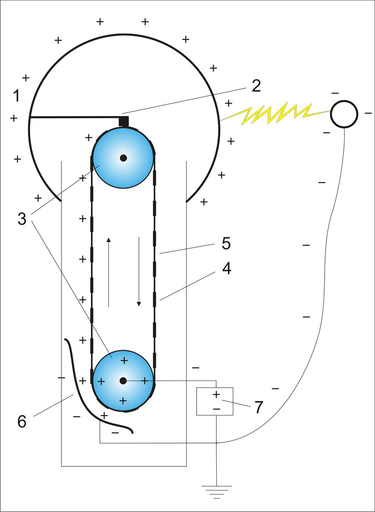 Пелетрон электростатический генератор